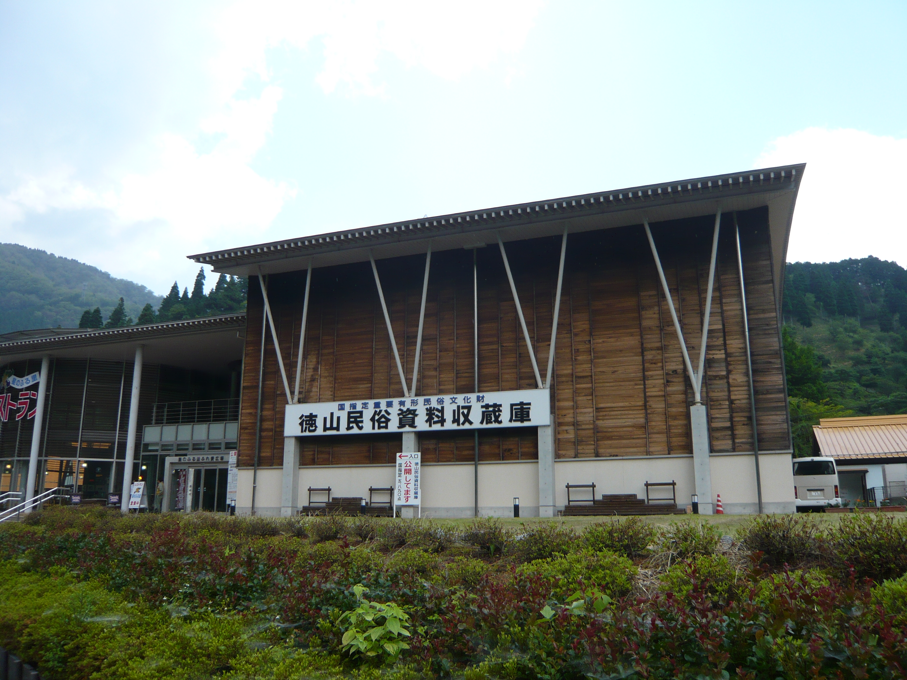 徳山民俗資料収蔵庫